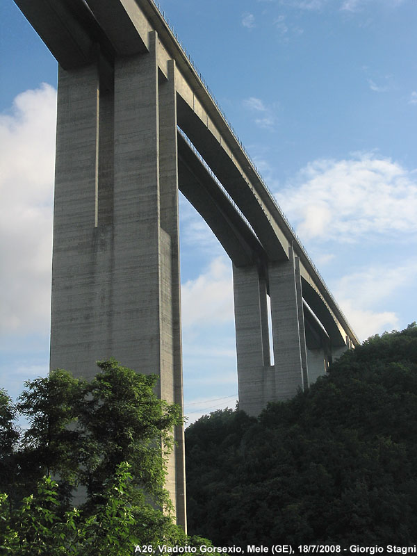 Il viadotto Gorsexio sull'autostrada A26 (strada europea E25) presso Mele.